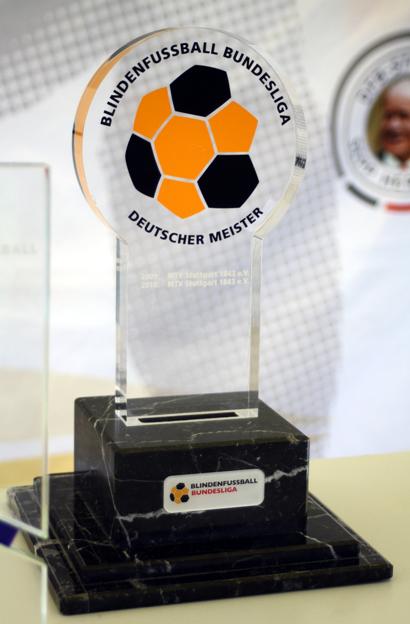 Blindenfussball, der Pokal. Eingraviert ist nur der Meister von 2009 und 2010. Fotografiert kurz vor der Übergabe an den Blindenfussball-Meister 2012 - Sportfreunde Blau-Gelb Marburg am 22.09.2012 auf dem Coubertinplatz im Münchener Olympiagelände.